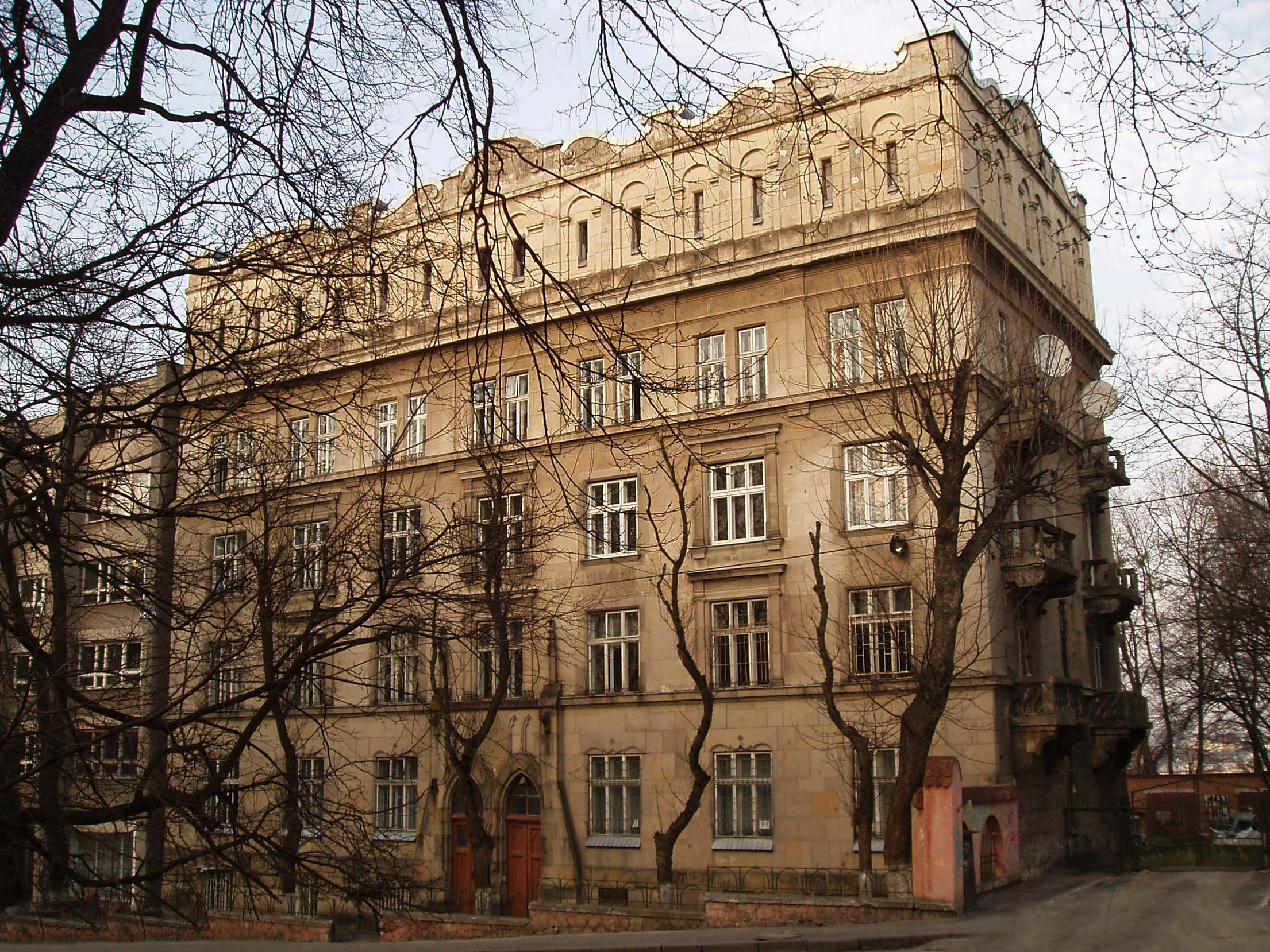 Будинок на вулиці Самчука, 11 у Львові, збудований у 1912 році. Архітектор Тадеуш Мостовський (1860-1929)